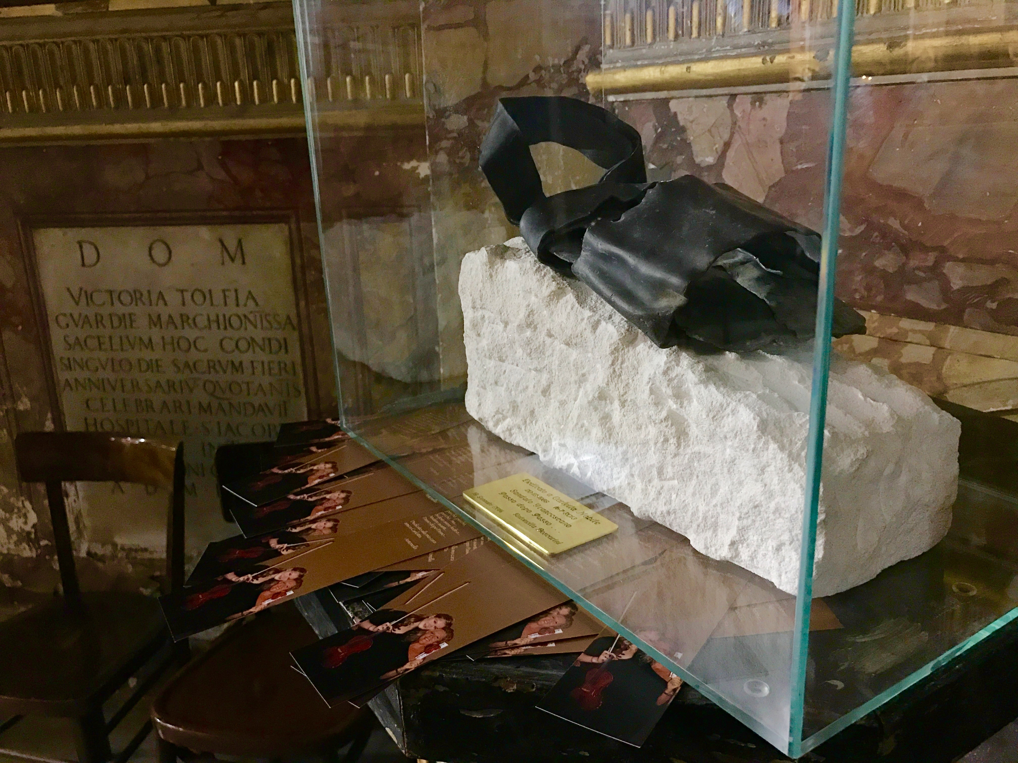 Domenica 19 gennaio 2014, l'artista Antonella Boscarini dona pubblicamente alla Chiesa di San Giacomo in Augusta (via del Corso, Roma), la scultura "Passo dopo Passo". L'opera, realizzata in forma di sandalo francescano mediante assemblaggio di materiale di riciclo e piombo, è dedicata alla memoria della «cara amica Carlotta Nobile, con la quale ho trascorso pochi ma intensi anni di stima e affetto reciproco».